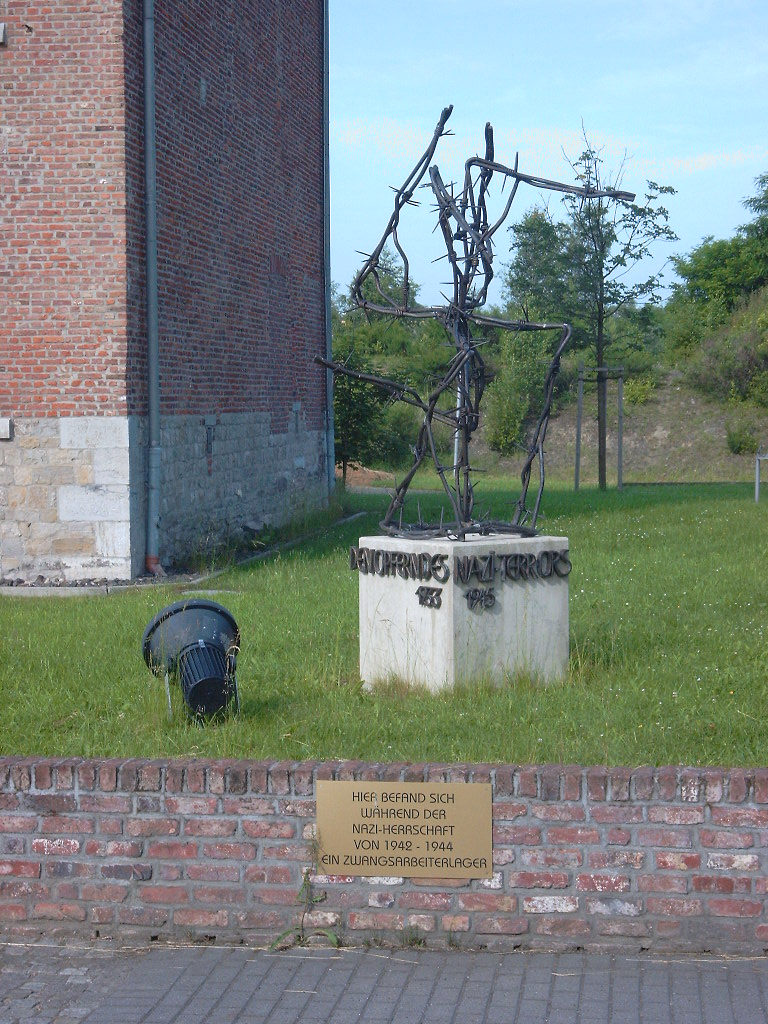 Stolberg, Zinkhütter Hof, Denkmal für die Opfer des Nationalsozialismus, umstritten wegen der Verwendung des Hakenkreuzsymbols, wenn auch der Stacheldraht eindeutig auf die Brutalität des Naziregimes hinweist.